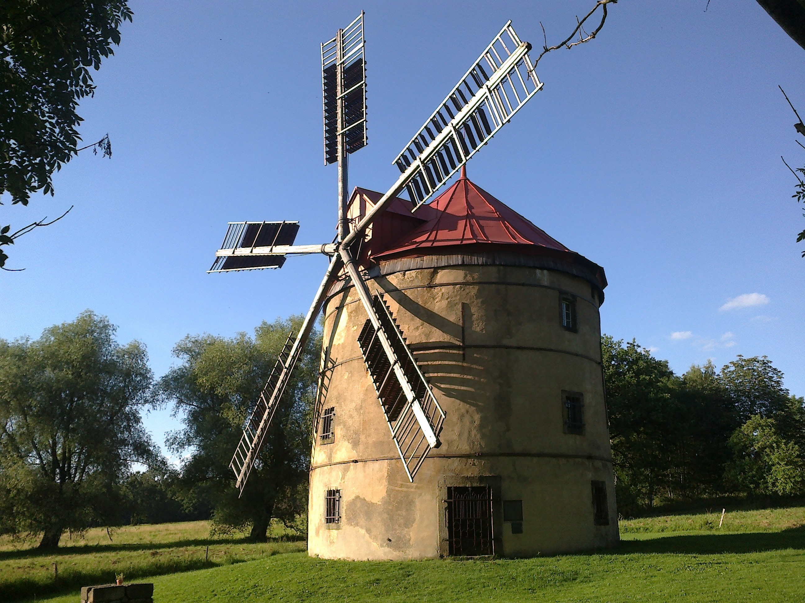 Větrný mlýn Světlík